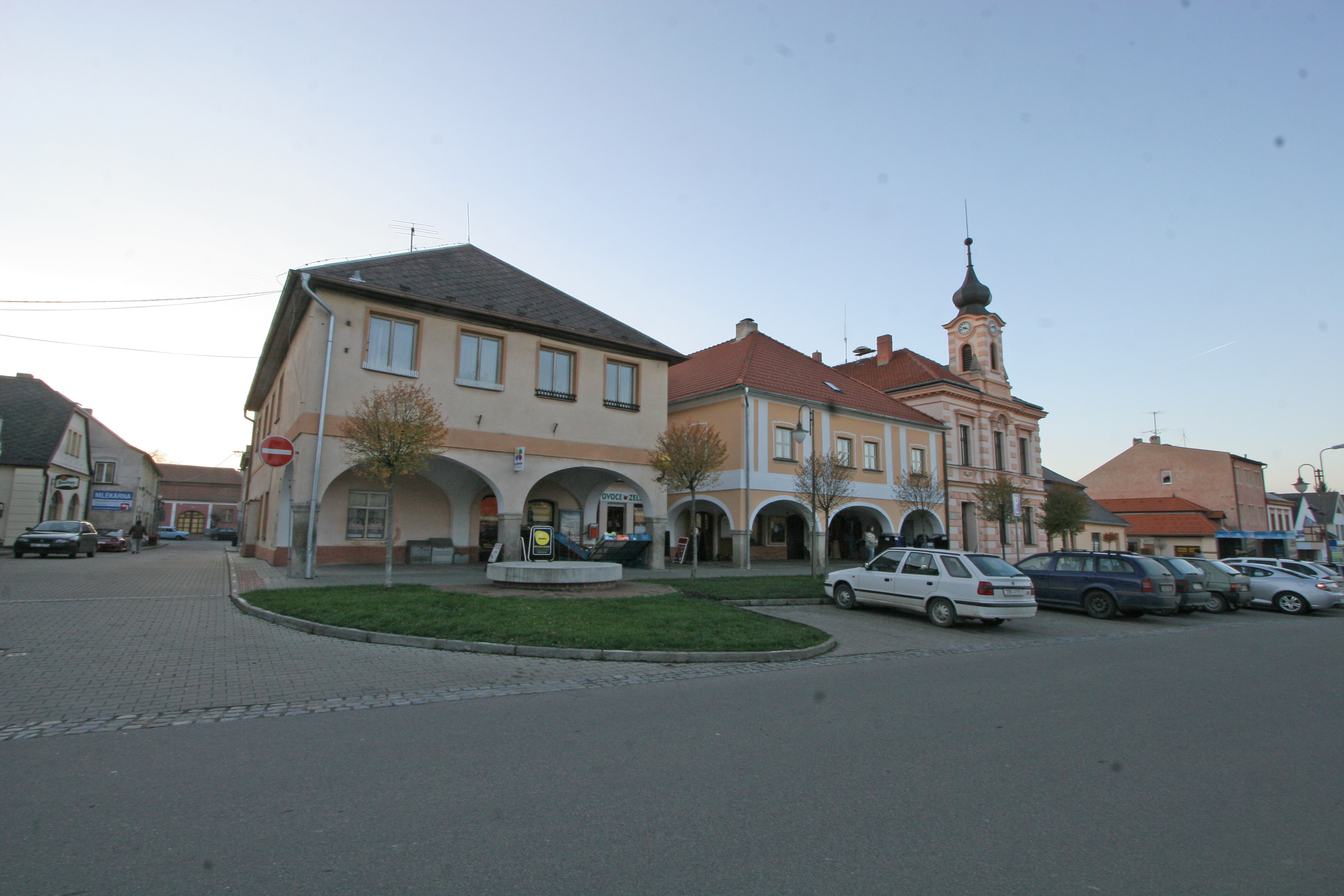 Měšťanský dům (Golčův Jeníkov), nám. T. G. Masaryka 111, Golčův Jeníkov